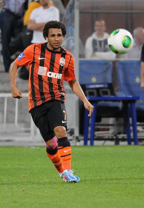 Веллінгтон Нем — бразильський футболіст, півзахисник